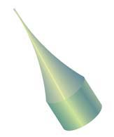 Filament Rod-YS